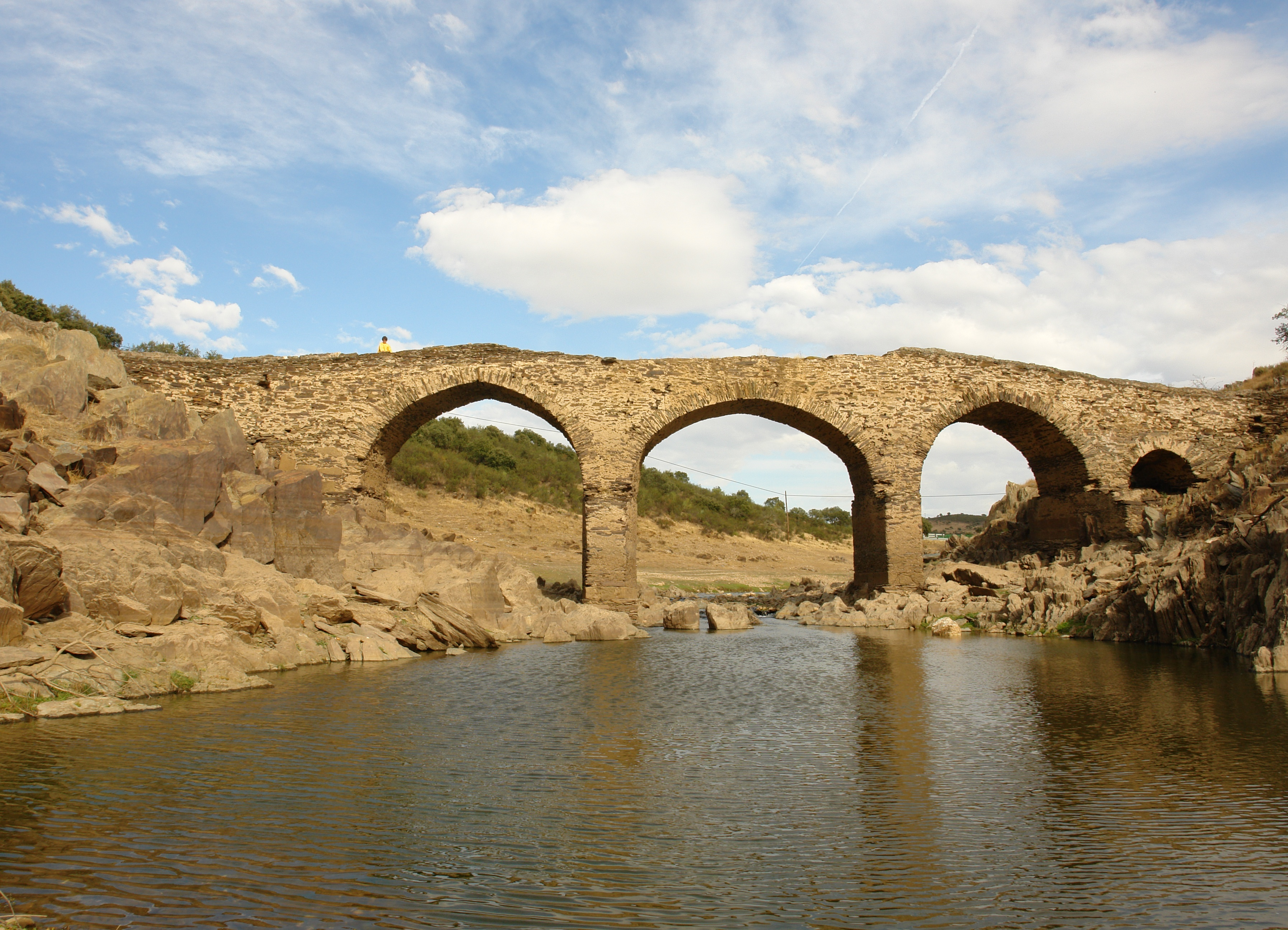 Puente del camino viejo de Ceclavín a Acehúche sobre la rivera de Fresnedosa.